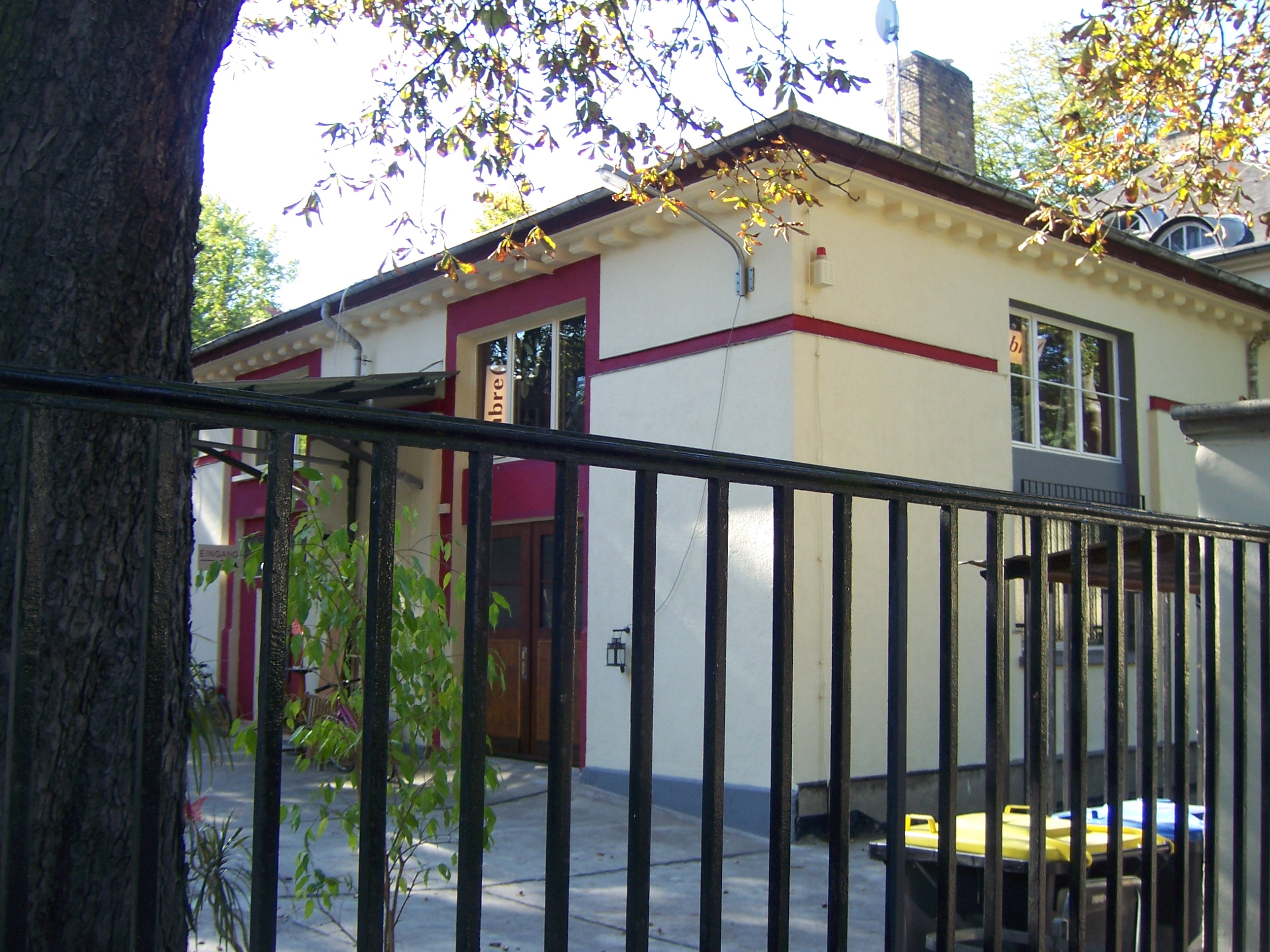 Atelier von Albrecht Leistner; Wohn- und Atelierhaus 1912 erbaut; Richard-Lehmann-Straße 12, Leipzig